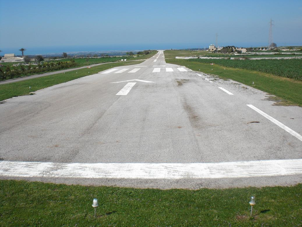 Aviosuperficie Giubiliana Ragusa, Sicilia. Marzo 2009